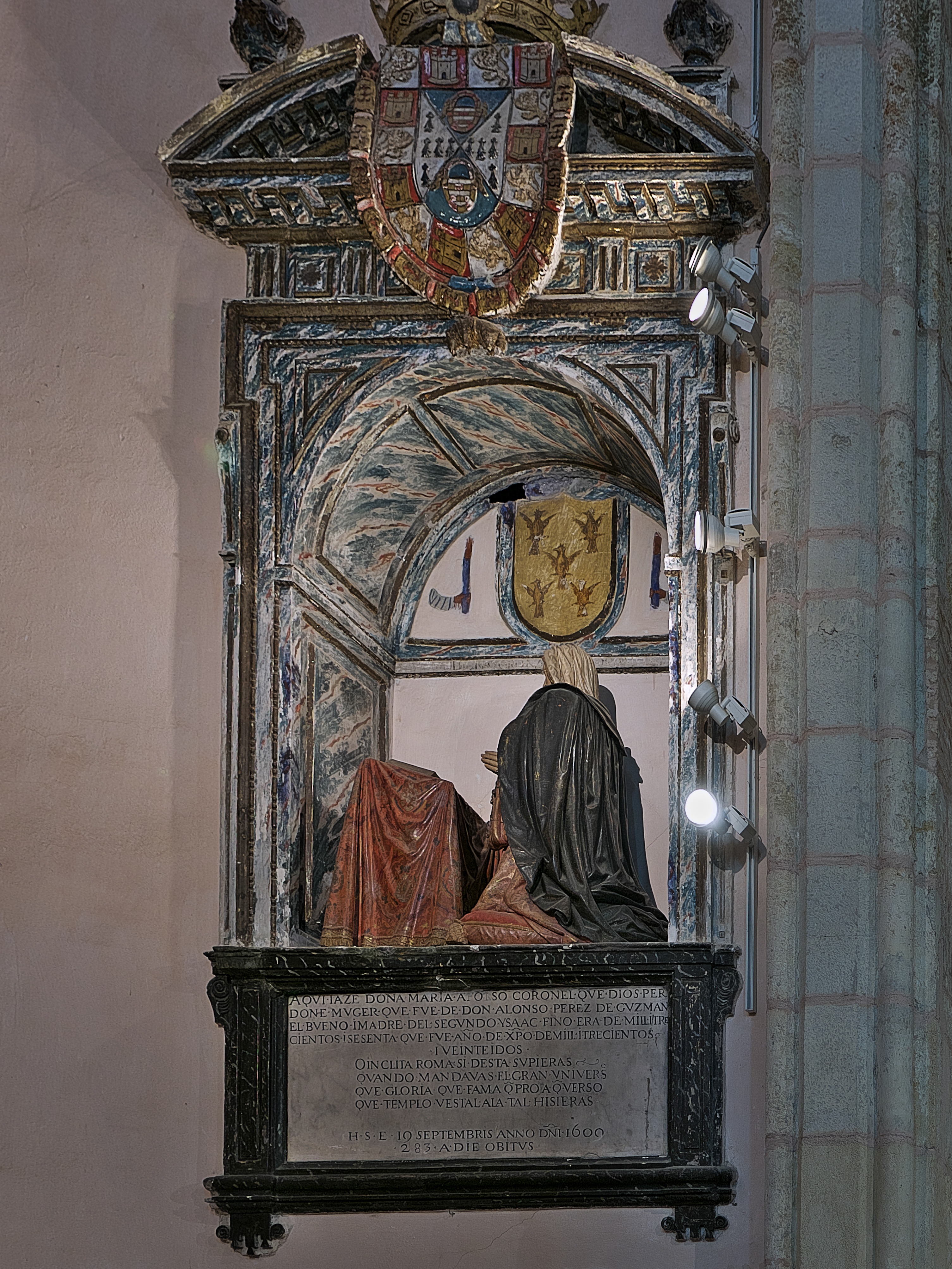 Lado de la Epístola del presbiterio de la capilla funeraria de Alonso Pérez de Guzmán, Monasterio de San Isidoro del Campo. Sepulcro de marmol con la figura orante en madera policromada de María Alonso Coronel, tallada por Juan Martínez Montañés (1609).